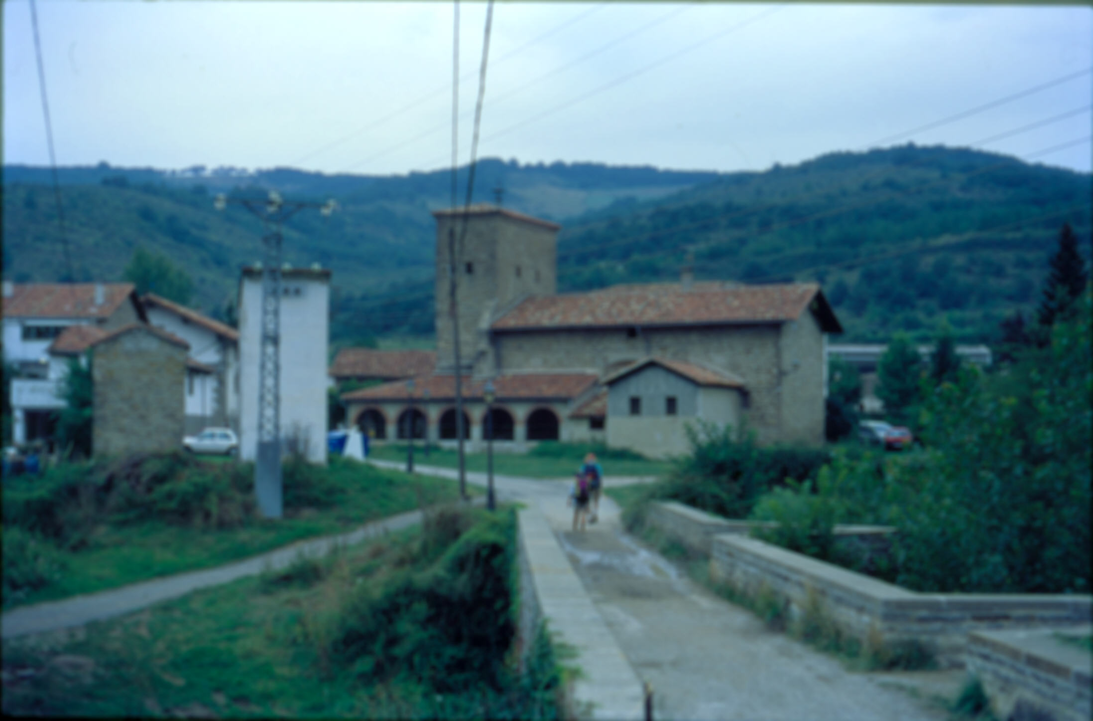 kirche san nicolas in larrasoaina / navarra